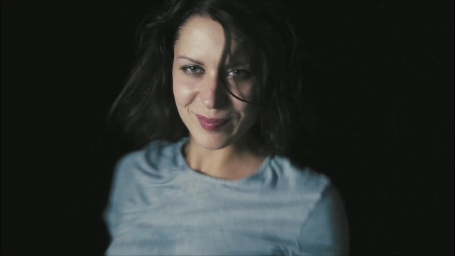 Elena Radonicich.